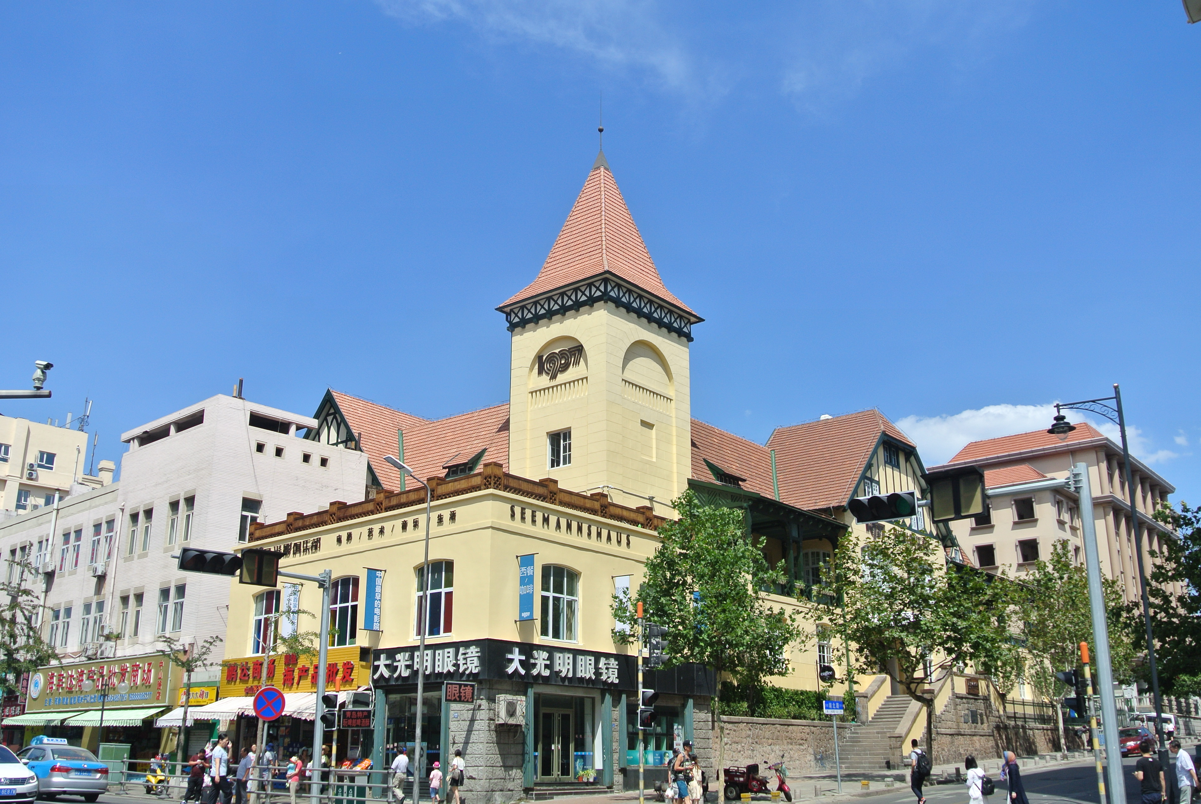 青岛水师饭店